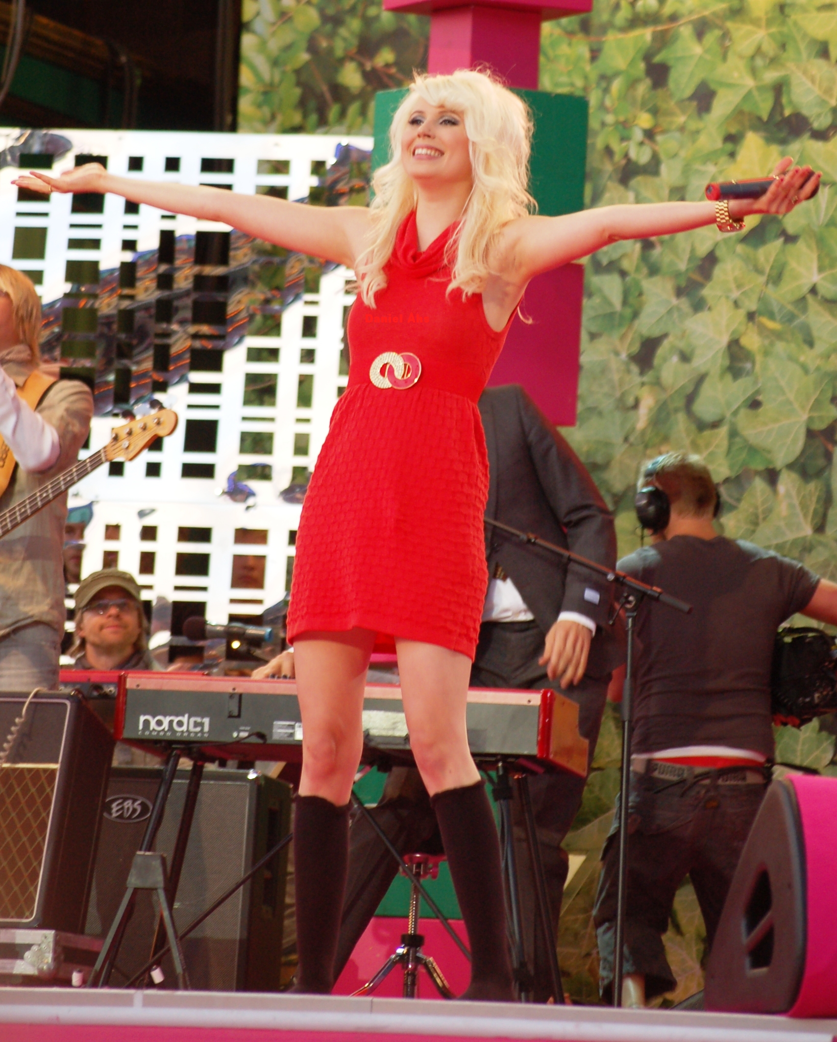 Amanda Jenssen på Sommarkrysset, Gröna Lund 2008